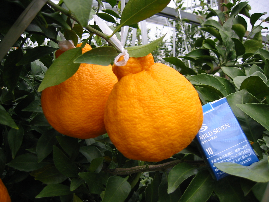 不知火 果実